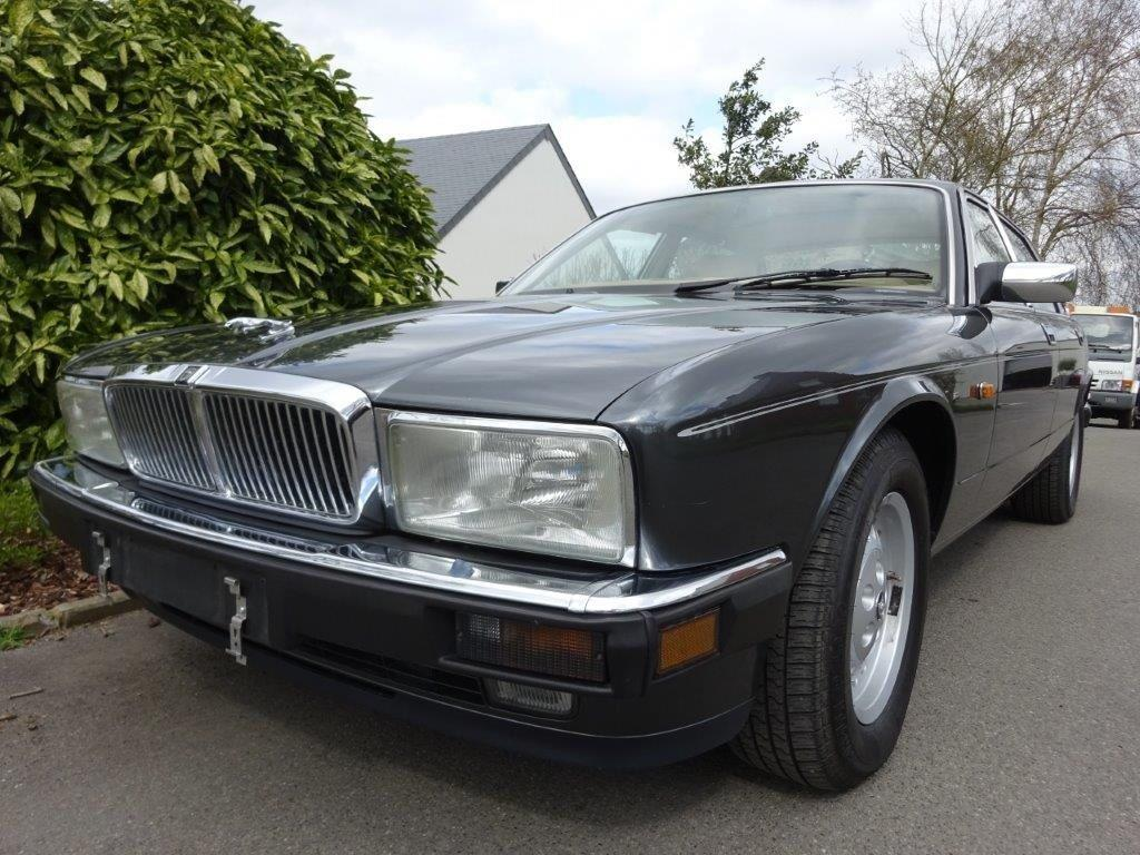 Jaguar XJ40 - Phares avant